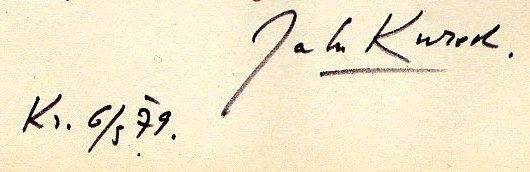 Jalu Kurek, pisarz, autograf.